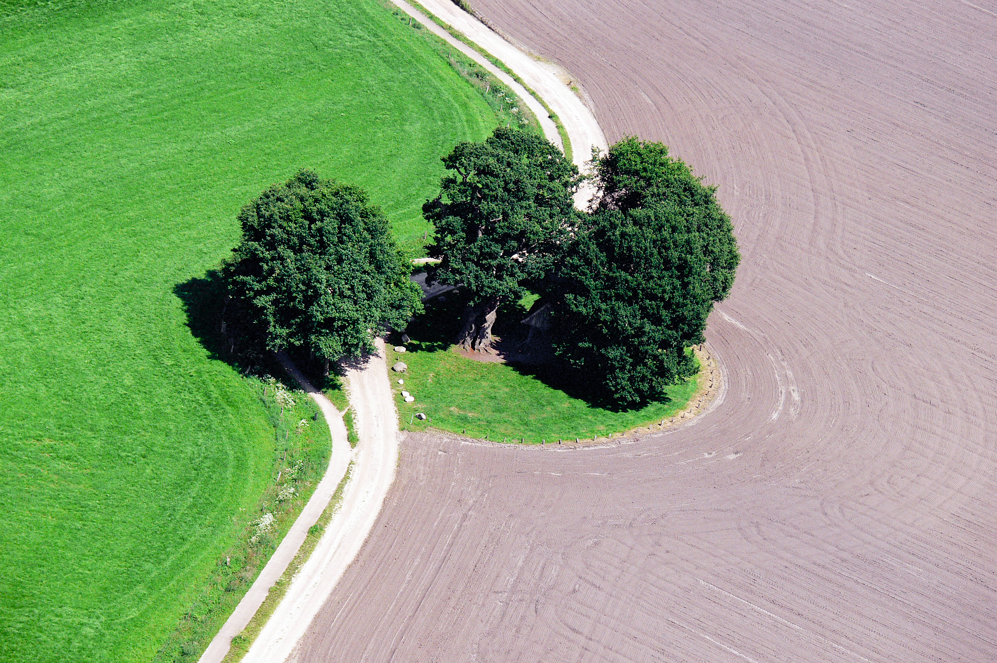 Luchtfoto Fleringen editie 20070523 Panasonic DMC-FZ30